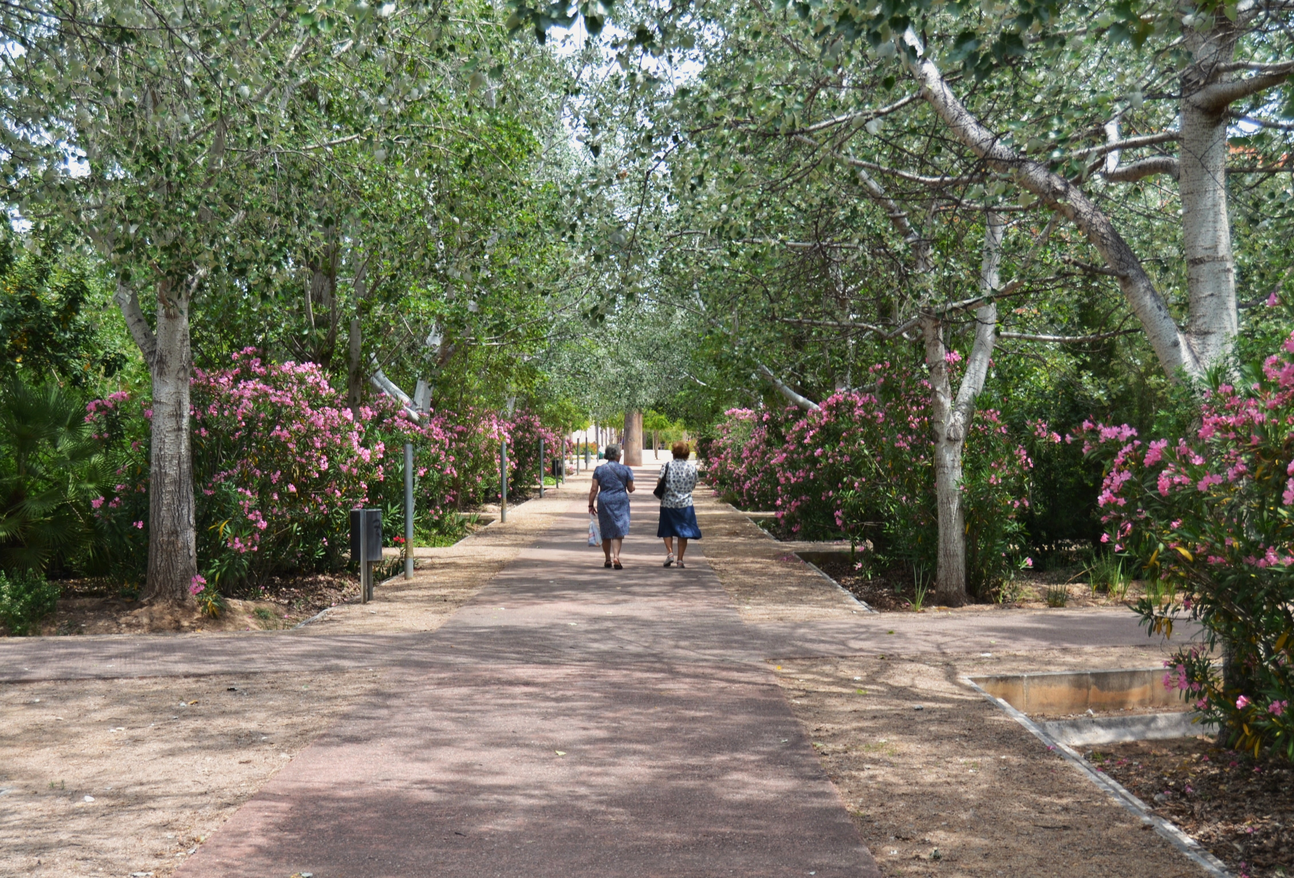 Passeig del xop, parc de Marxalenes, València.